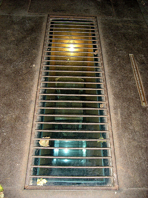 Die Verhörzelle ist ein Mahnmal für die Geschwister Scholl und andere Opfer des Naziregimes. Das Mahnmal befindet sich in Hamburg-Eppendorf Geschwister-Scholl-Straße 1 und wurde dort am 2. Oktober 1990 von Gerd Stange Politbildhauer in ein Gartenstück der Freien Hansestadt Hamburg installiert.